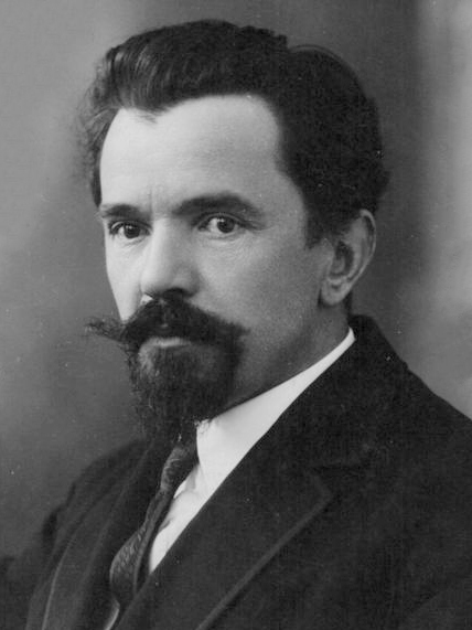 Mykolas Krupavičius